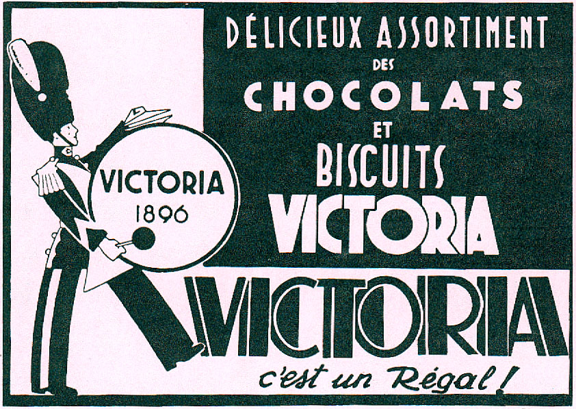 Publicité de la biscuiterie-chocolaterie Victoria à Koekelberg.